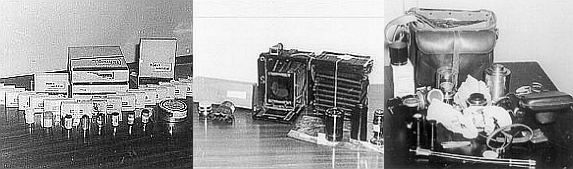 Sichergestellte Fotausrüstung von Rudolf Abel